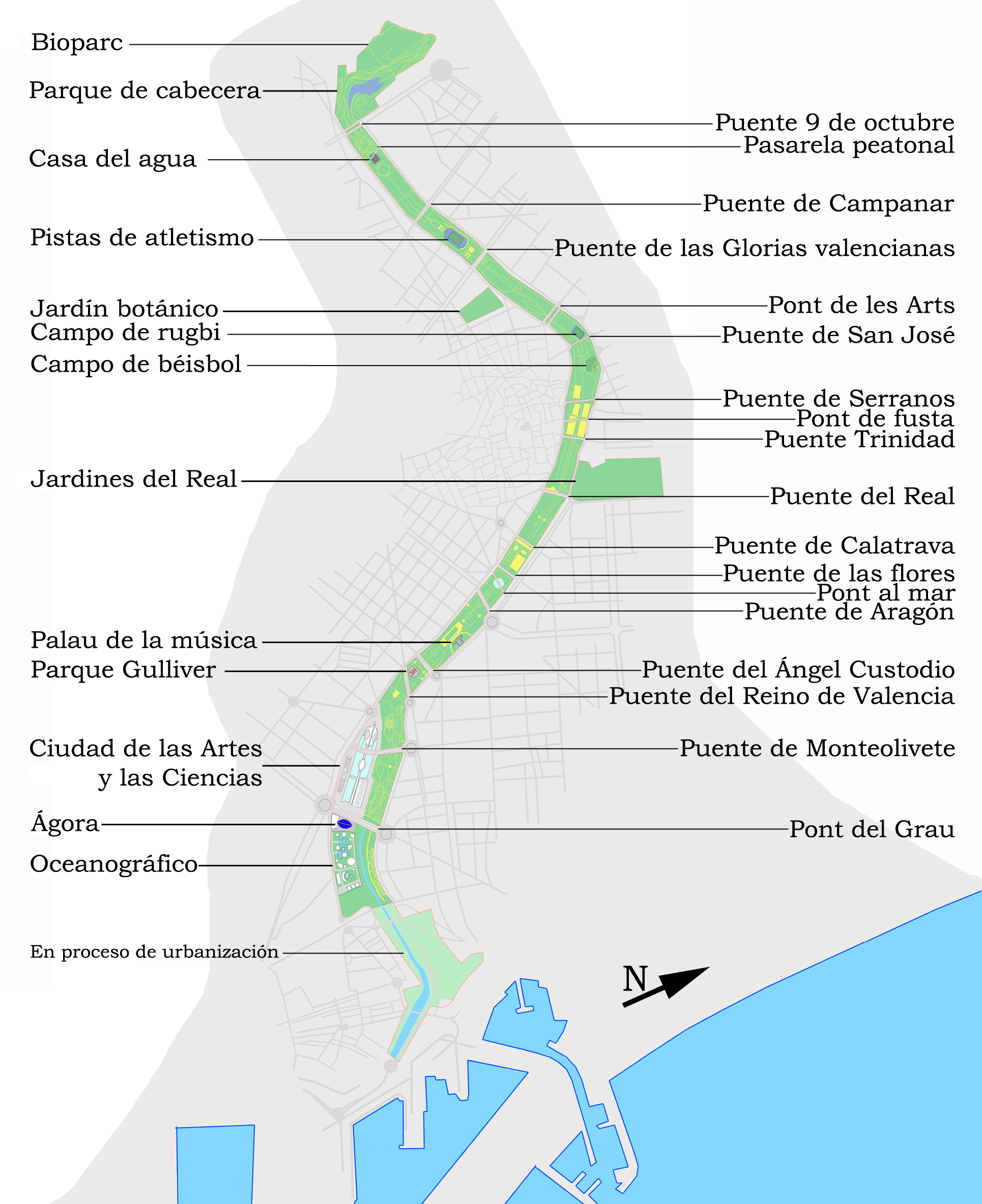 Plano del Jardín del Turia de la ciudad de Valencia mostrando el equipamiento público existente y los puentes que lo cruzan